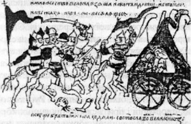 Мініатюра